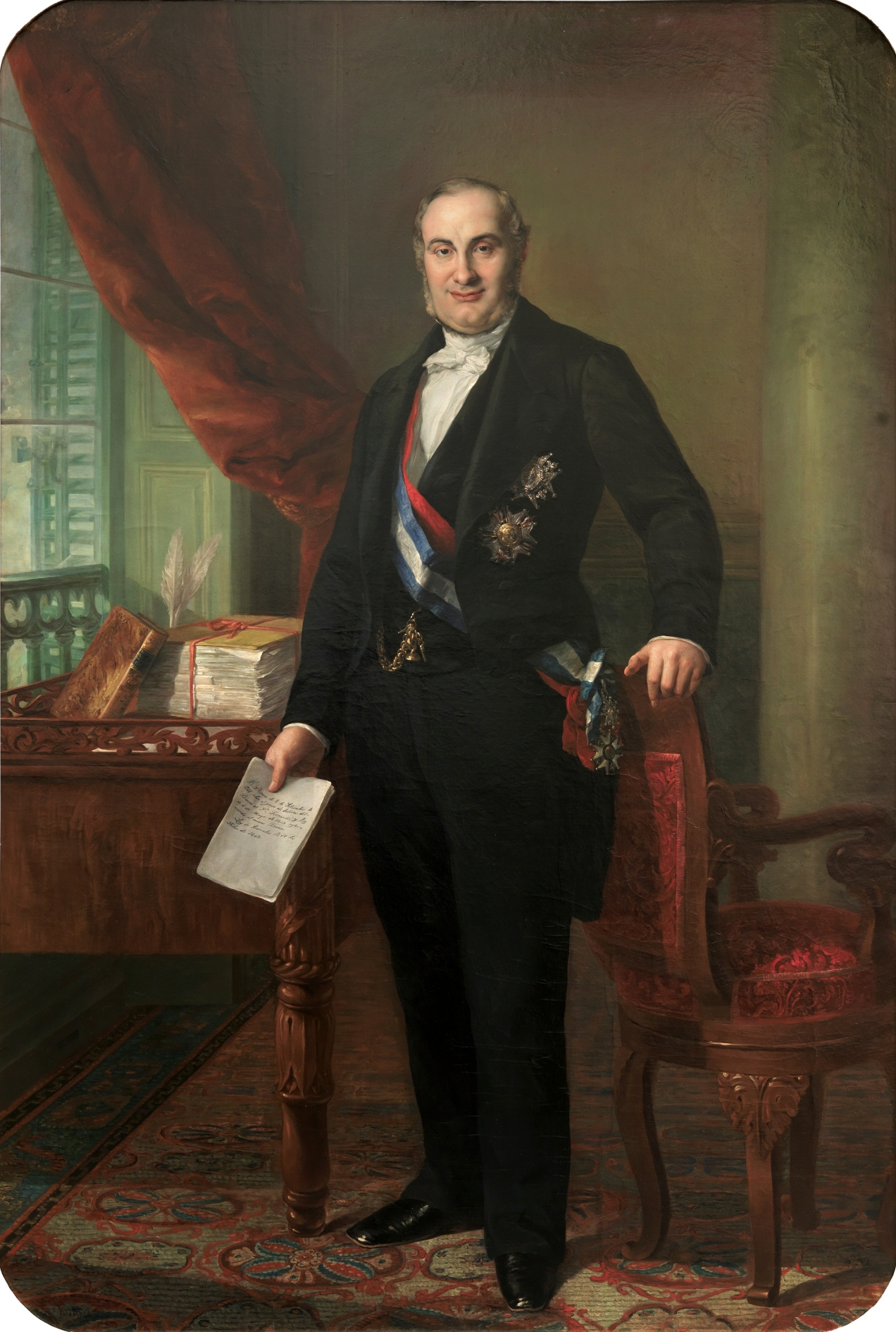 Retrato del político y jurista español Alejandro Mon y Menéndez (1801-1882).